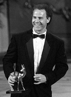 Factual corrections and alternative descriptions are encouraged separately from the original description. Additionally errors can be reported at this page to inform the Bundesarchiv. Original historic description: Leipzig, Bambi-Verleihung, Franz Beckenbauer BER-23/27.11.90/Leipzig: Bambi-Preisverleihung / Vor zahlreich vertretener Prominenz aus Politik, Kultur und Medien sowie aus Wirtschaft, Sport, Showbusiness und Gesellschaft fand im Opernhaus am Augustus-Platz die Surda-Medienpreisverleihung statt. Fußballstar Franz Beckenbauer wurde mit dem Sport-Bambi-Preis für seine Intuition und Perfektion geehrt, mit der er als Teamchef die deutsche Nationalmannschaft 1990 zum WM-Titel geführt hatte. Abgebildete Personen: * Beckenbauer, Franz: Fußballnationalspieler, Bundesrepublik Deutschland (GND 118508067)